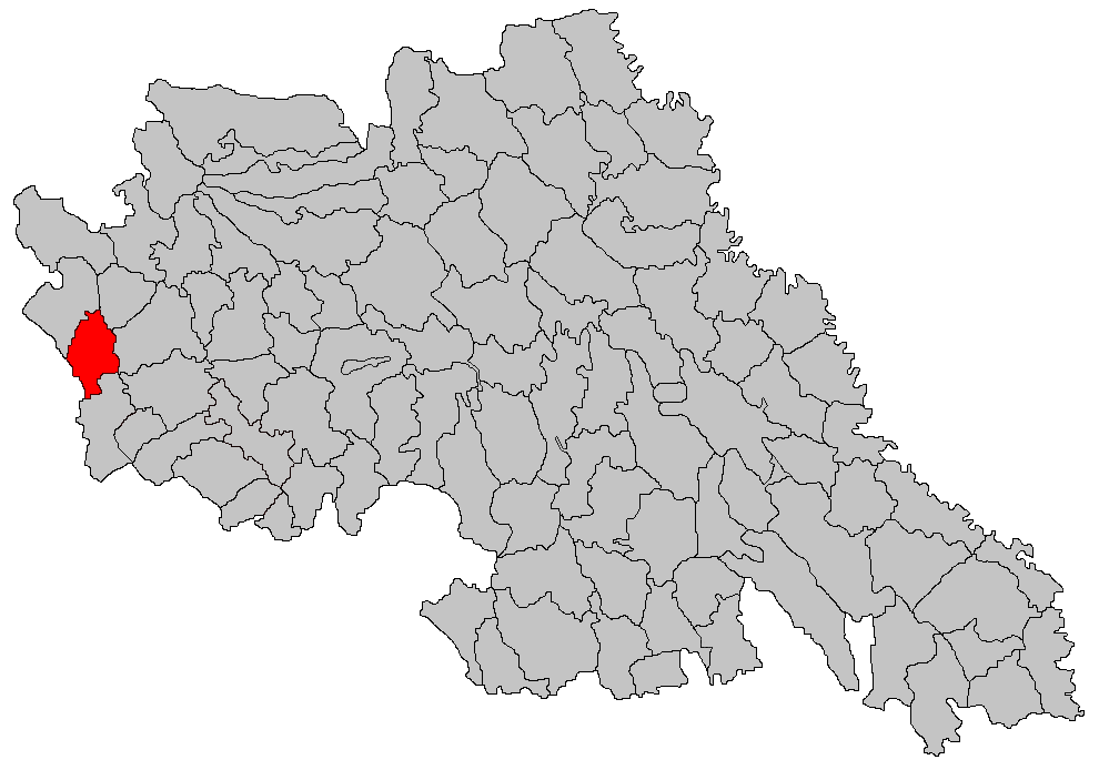 Categorie:Hărţi ale judeţului Iaşi